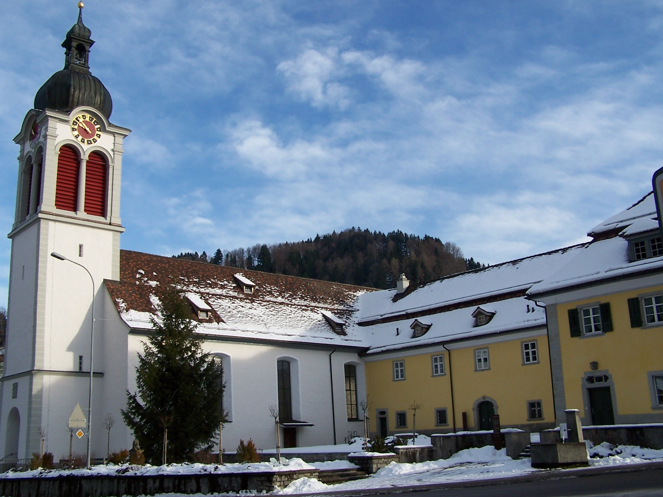 Katholische Pfarrkirche St. Peter in St. Peterzell, Schweiz